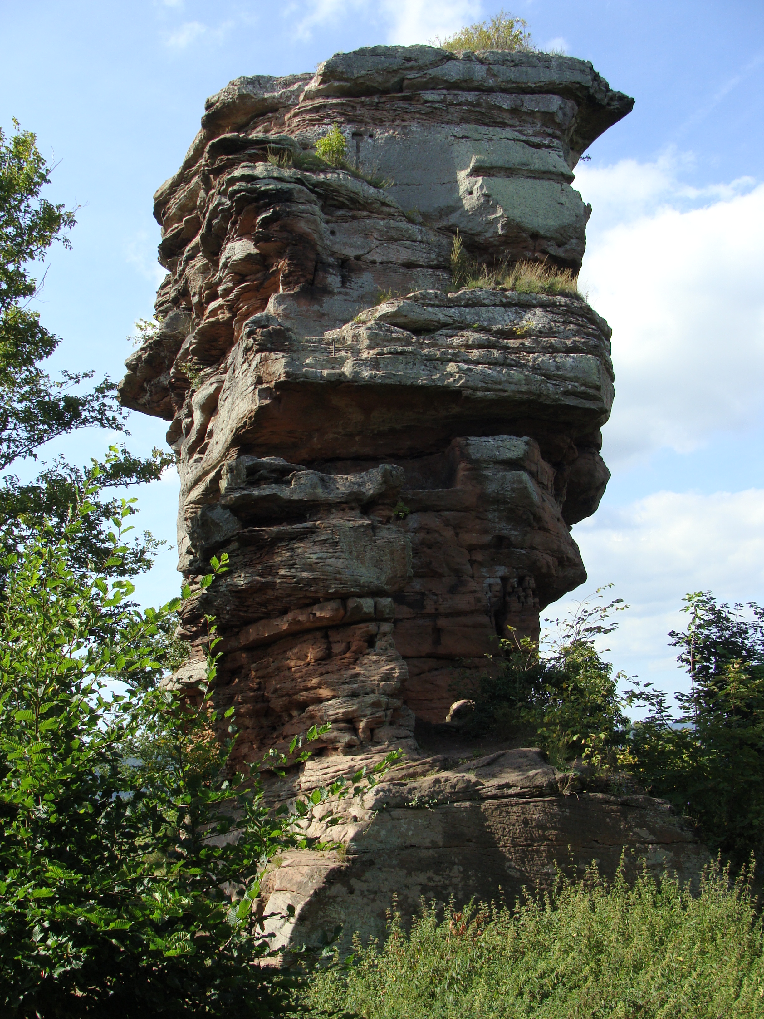 Burg Anebos am Trifels im Wasgau/Pfälzerwald